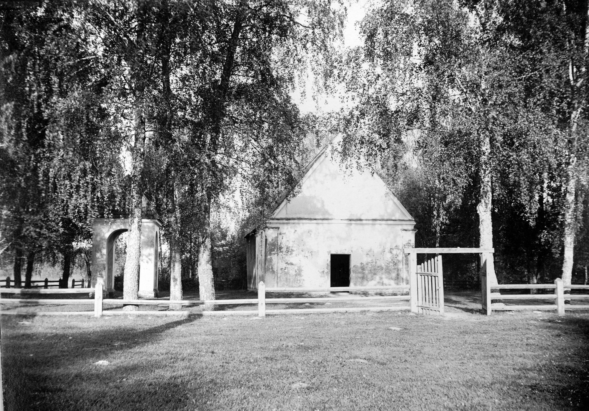 Беларуская (тарашкевіца): Гарадзея (Haradzieja), урочышча Урвант (Urvant). Царква Сьвятога Спаса